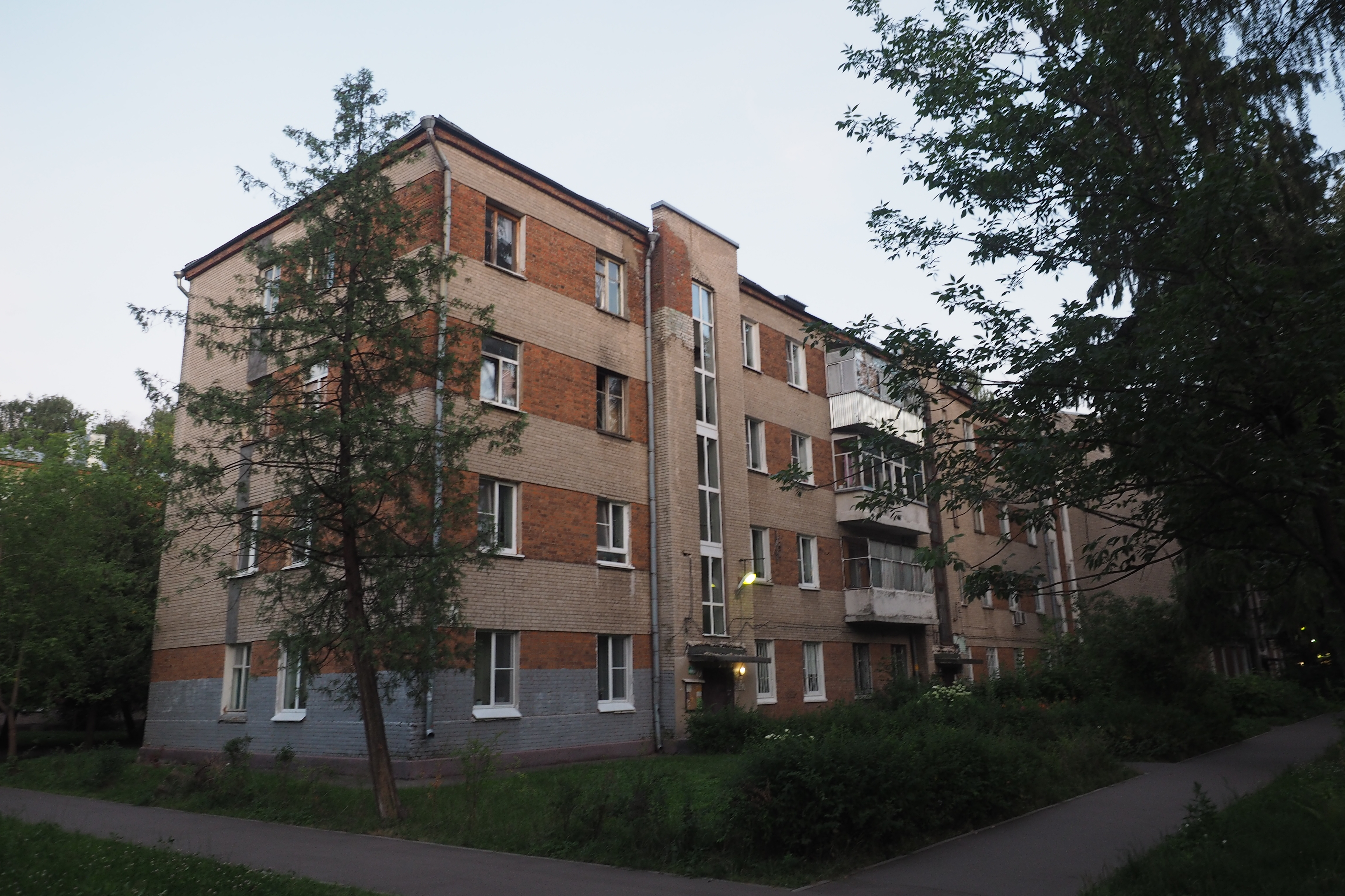 Посёлок Монино